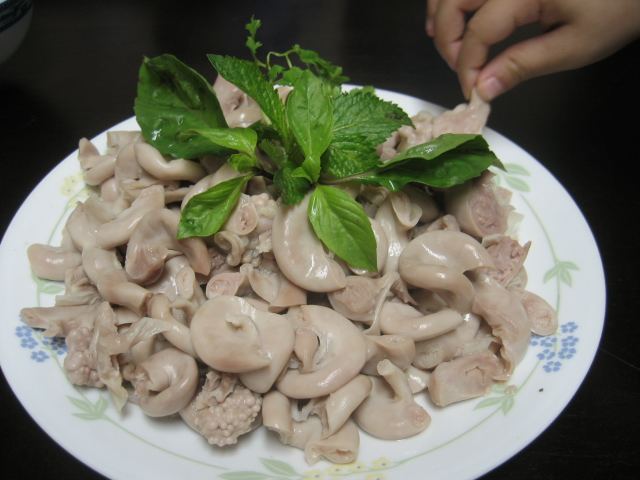 Tràng lợn luộc (chỗ buồng trứng)